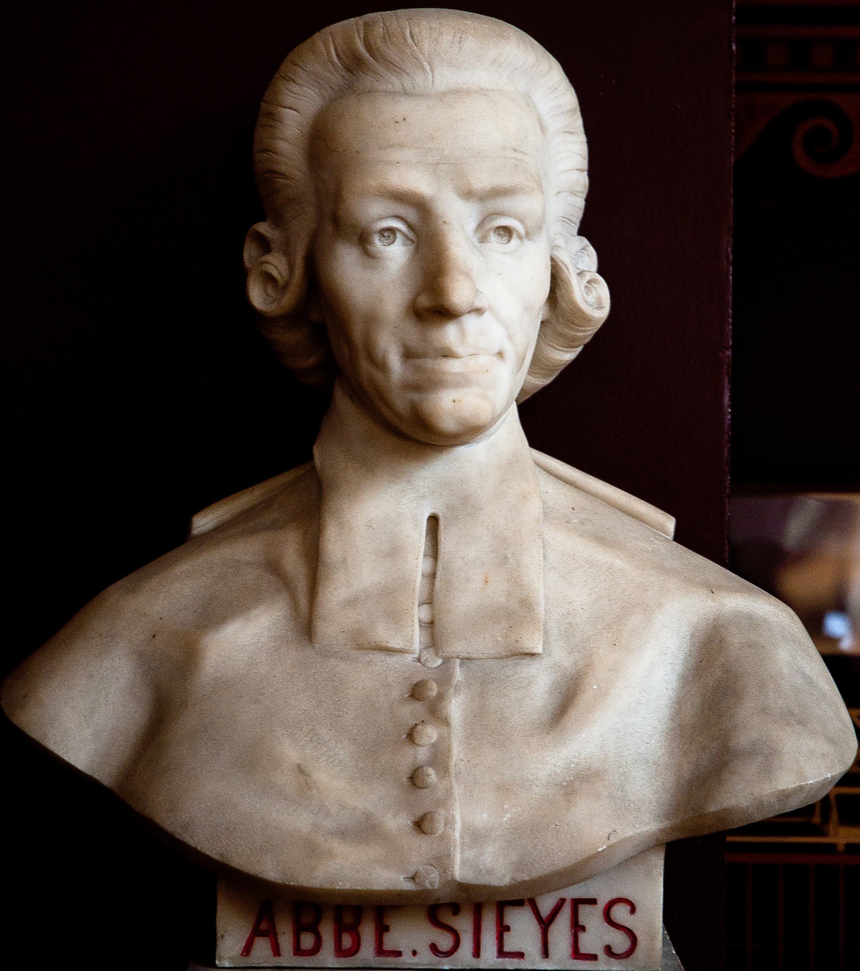 Buste de Emmanuel-Joseph Sieyès -- Salle du serment du jeu de paume -- Versailles